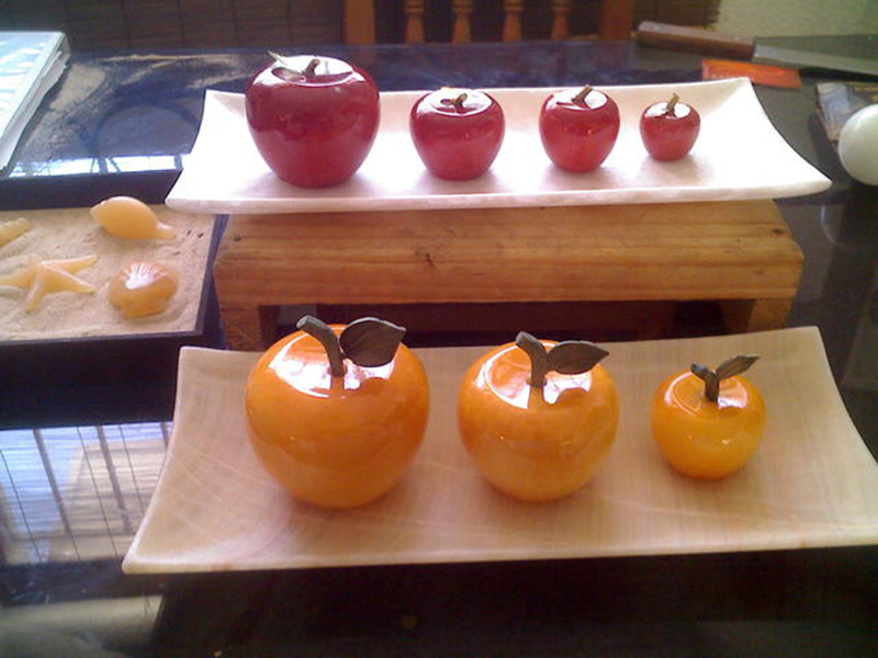 Artesanía en piedra onix color amarillo y rojo